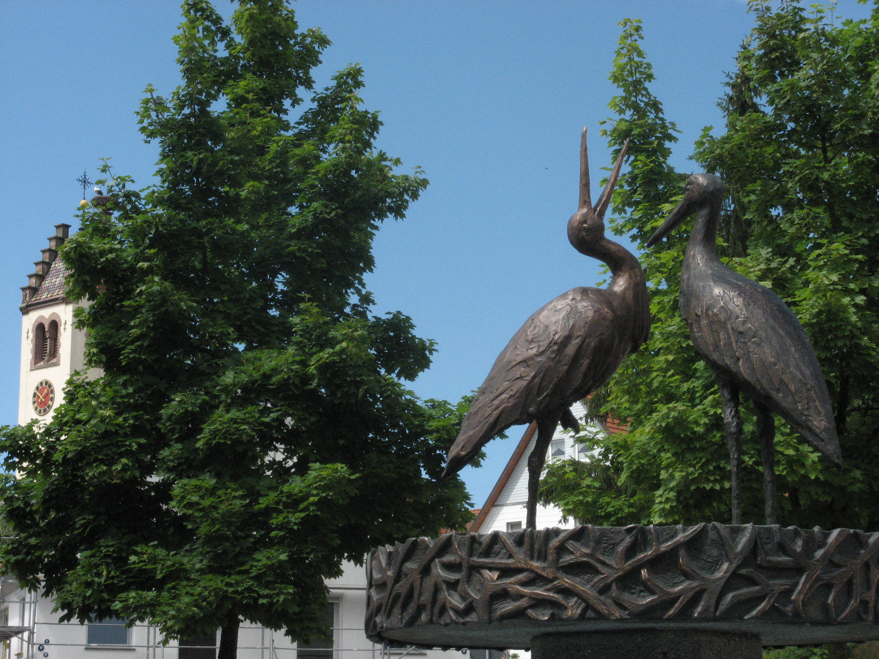 Oeuvre dans le cadre du projet "Le Danube et les oeuvres"